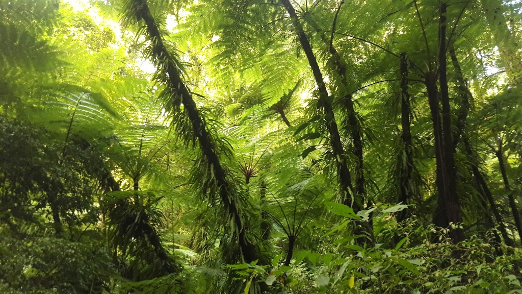 Helechos arborescentes (especia amenazada) que forman parte del bosque mesofilo